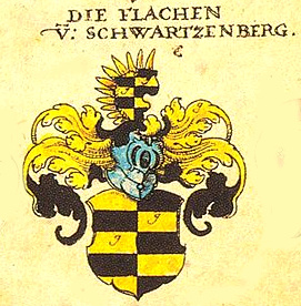 Wappen der Flachen (Flach) von Schwartzenberg